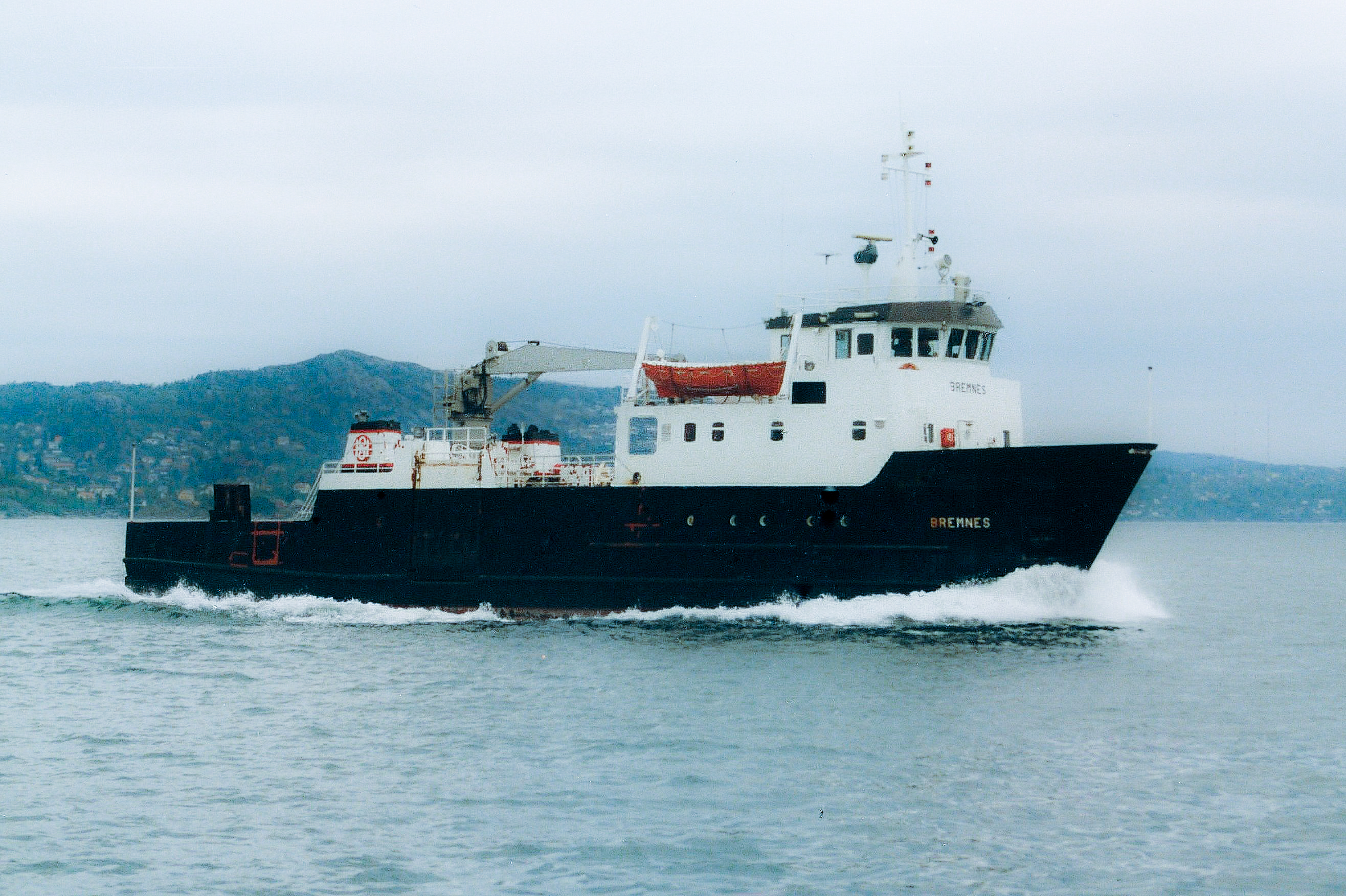 MS Bremnes, bygget i 1978. Foto Harald Sætre.